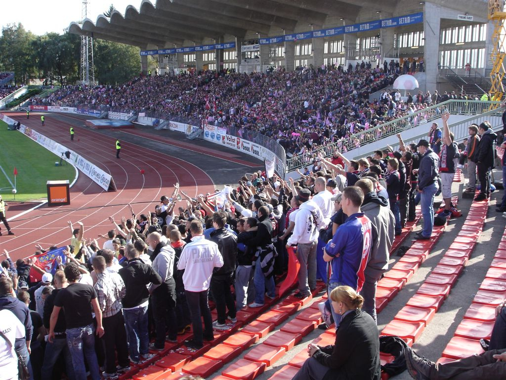 Le Virage Nord Parc des Sports d'Annecy (Haute-Savoie, France) lors du match de football (ligue 1) Thonon-Gaillard FC/Paris-Saint-Germain ( 2-2) le 18 septembre 2011.